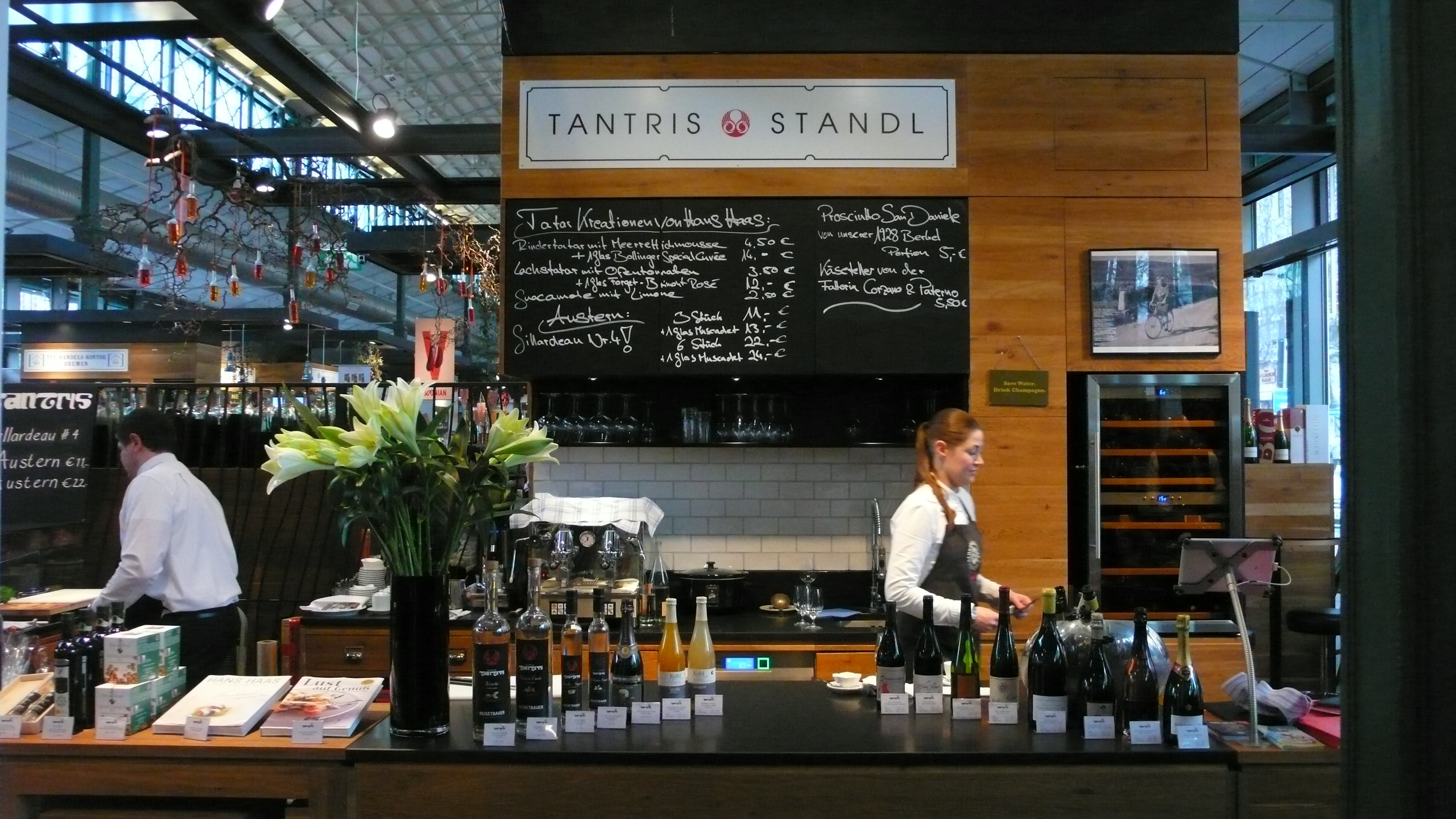 Tantris Filiale in der Münchner Schrannenhalle (Viktualienmarkt)